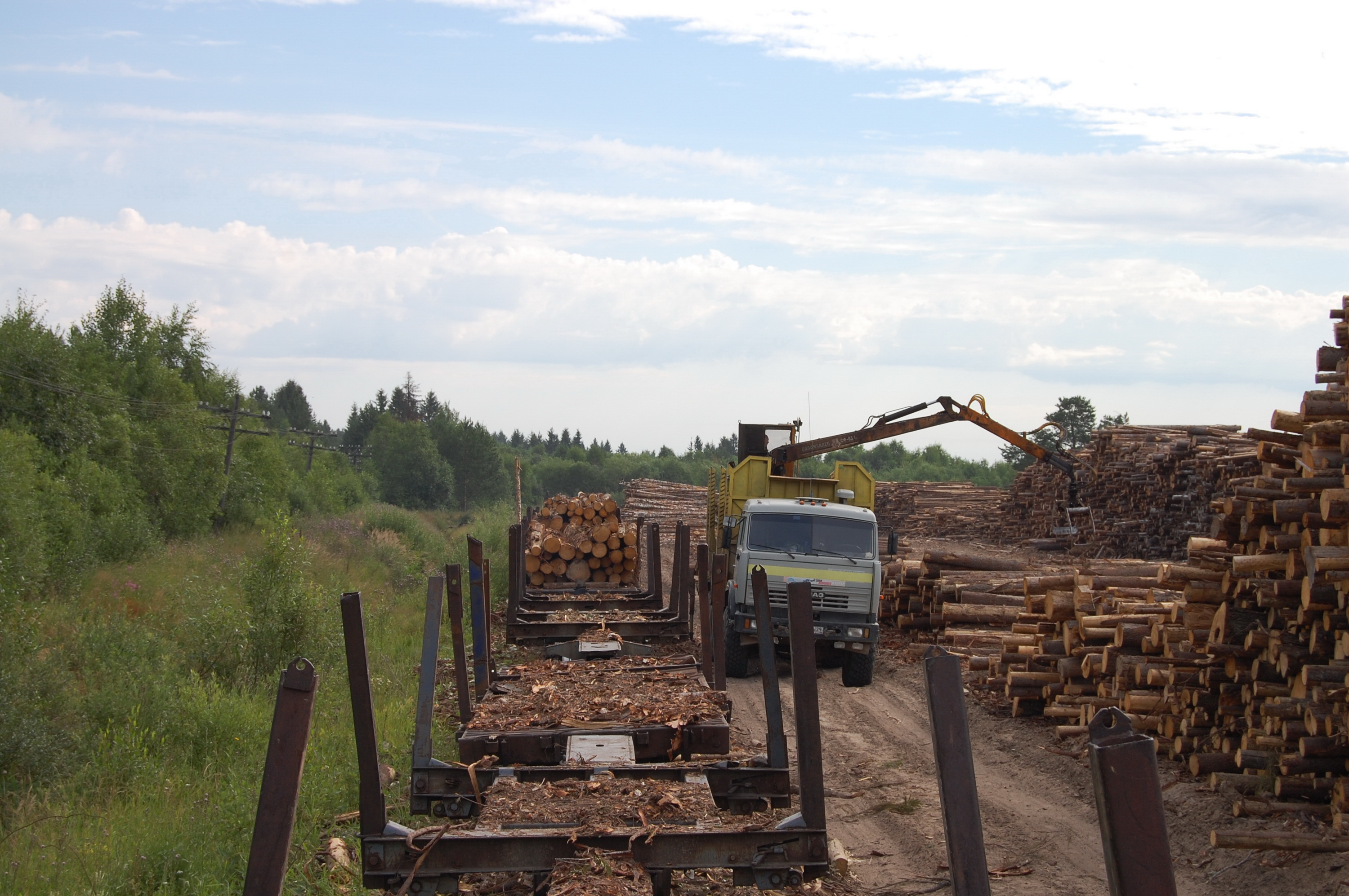 Вагон сцеп